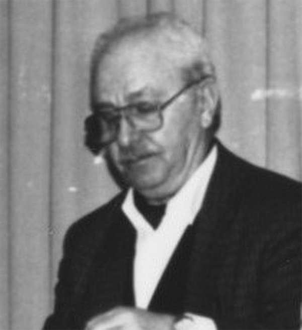 Pierre Lambert en 1988 à Montpellier